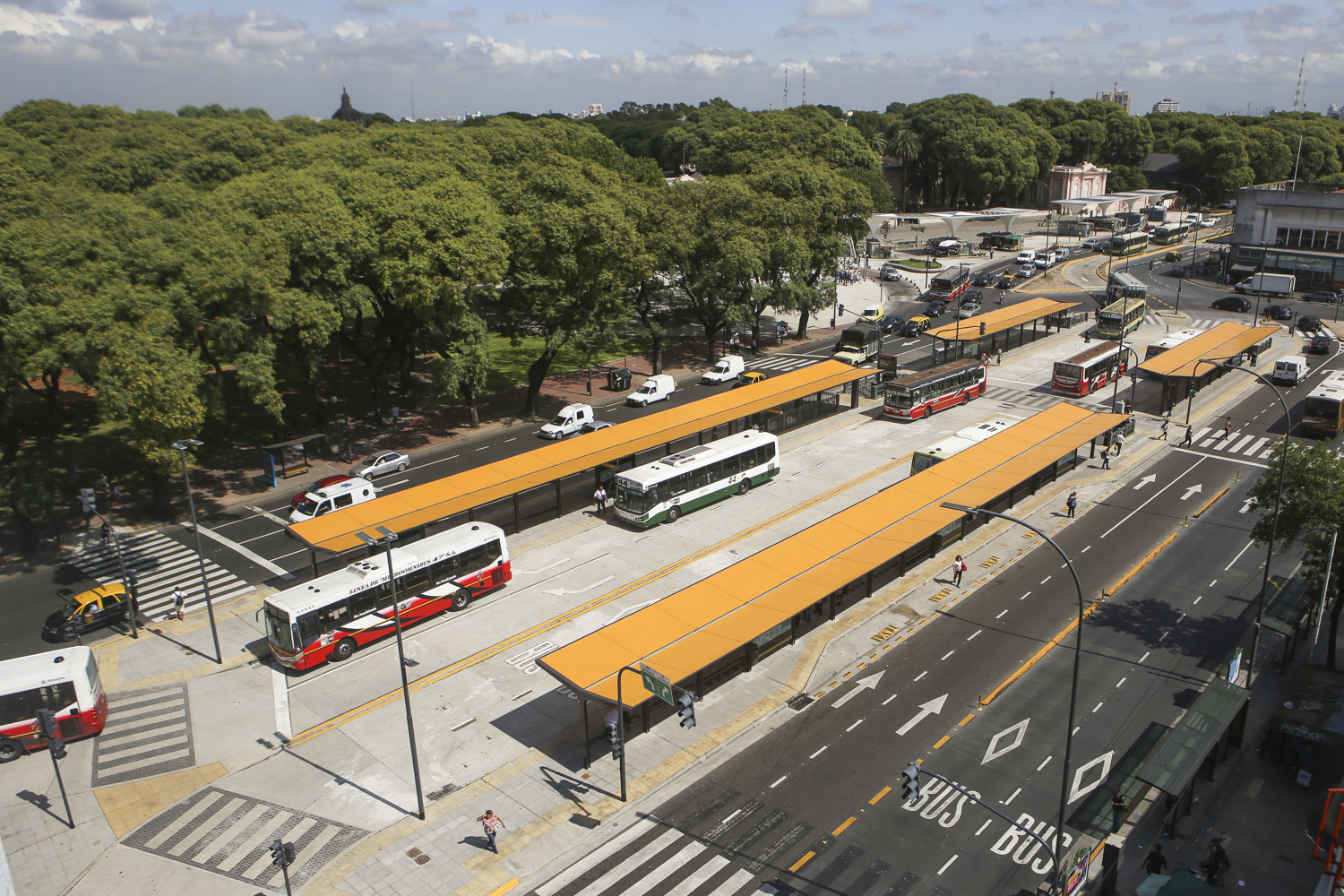 Centro de Trasbordo Federico Lacroze en detalle